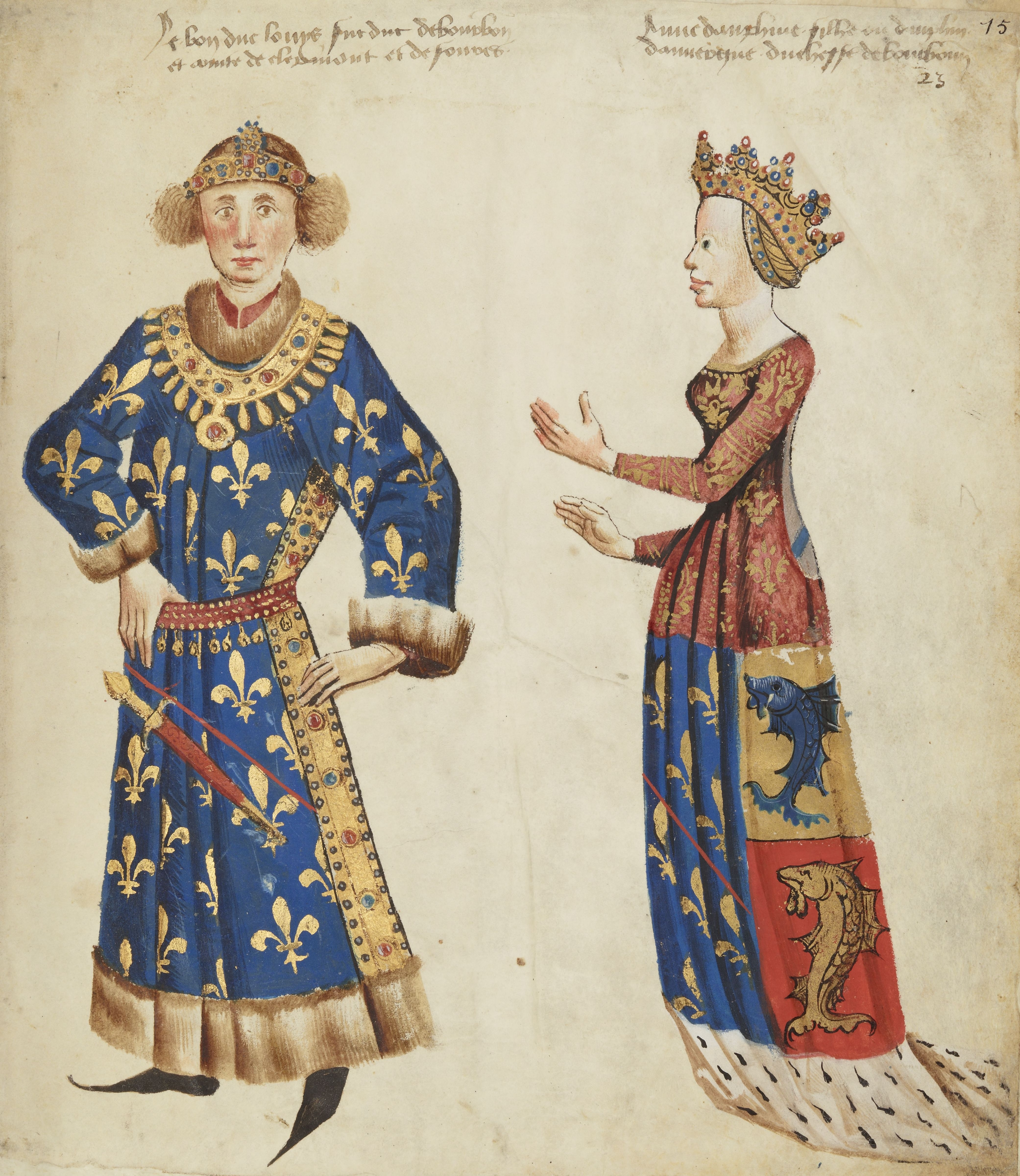 Louis II de Bourbon et son épouse Anne de Forez, issu de l'armorial d'auvergne page 15 (BNF, Français 22297)